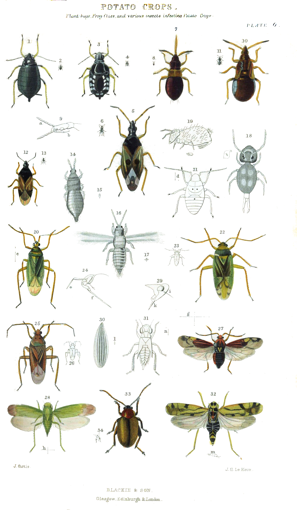 Potato pests